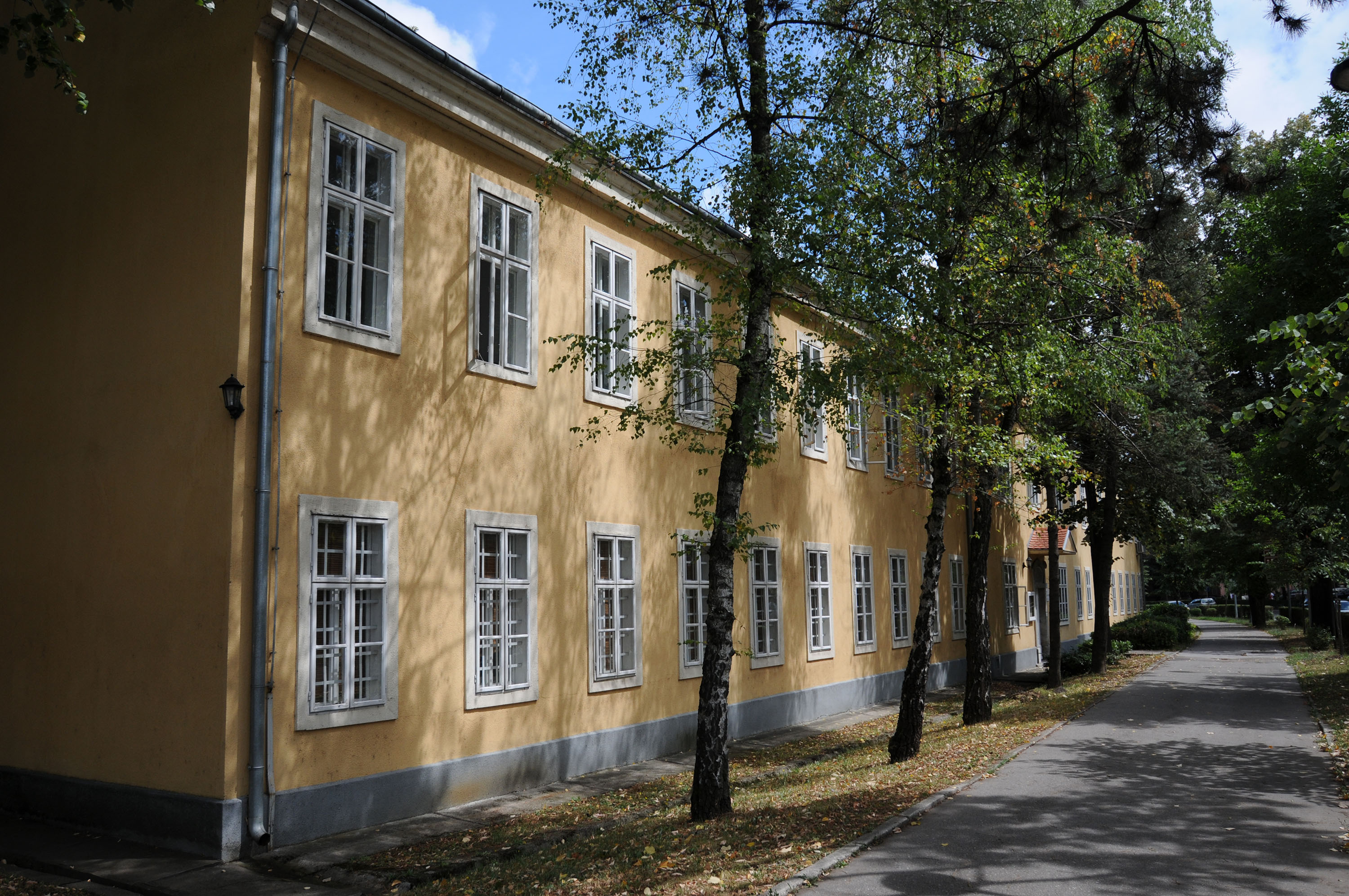 carska kuca - arhiv RS Banja Luka ul aleja svetog save Сликава е подигната во рамките на проектот „По трагата на душата 2015“.